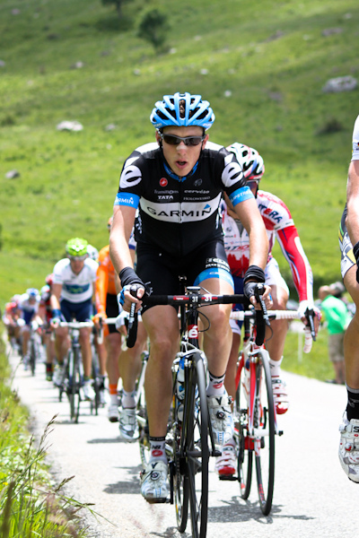 Etape 6 (Col des Aravis) du Critérium du Dauphiné 2011